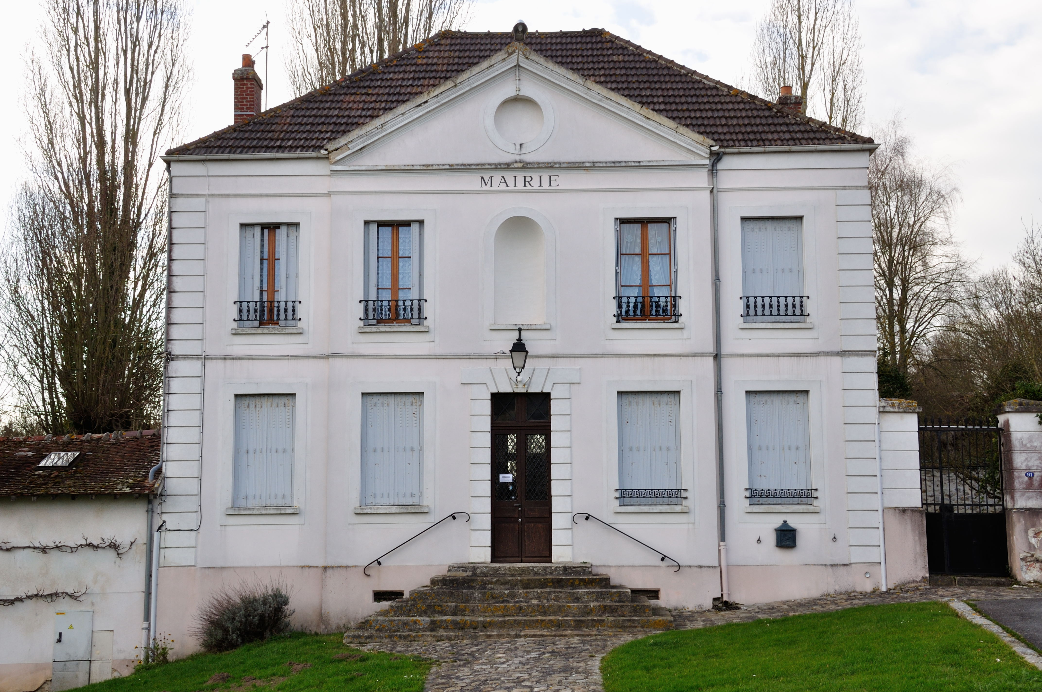 Mairie d'Aulnoy. (Seine-et-Marne, région Île-de-France).